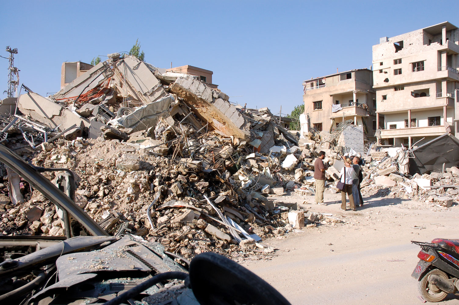 Israeli bombing in Baalbek